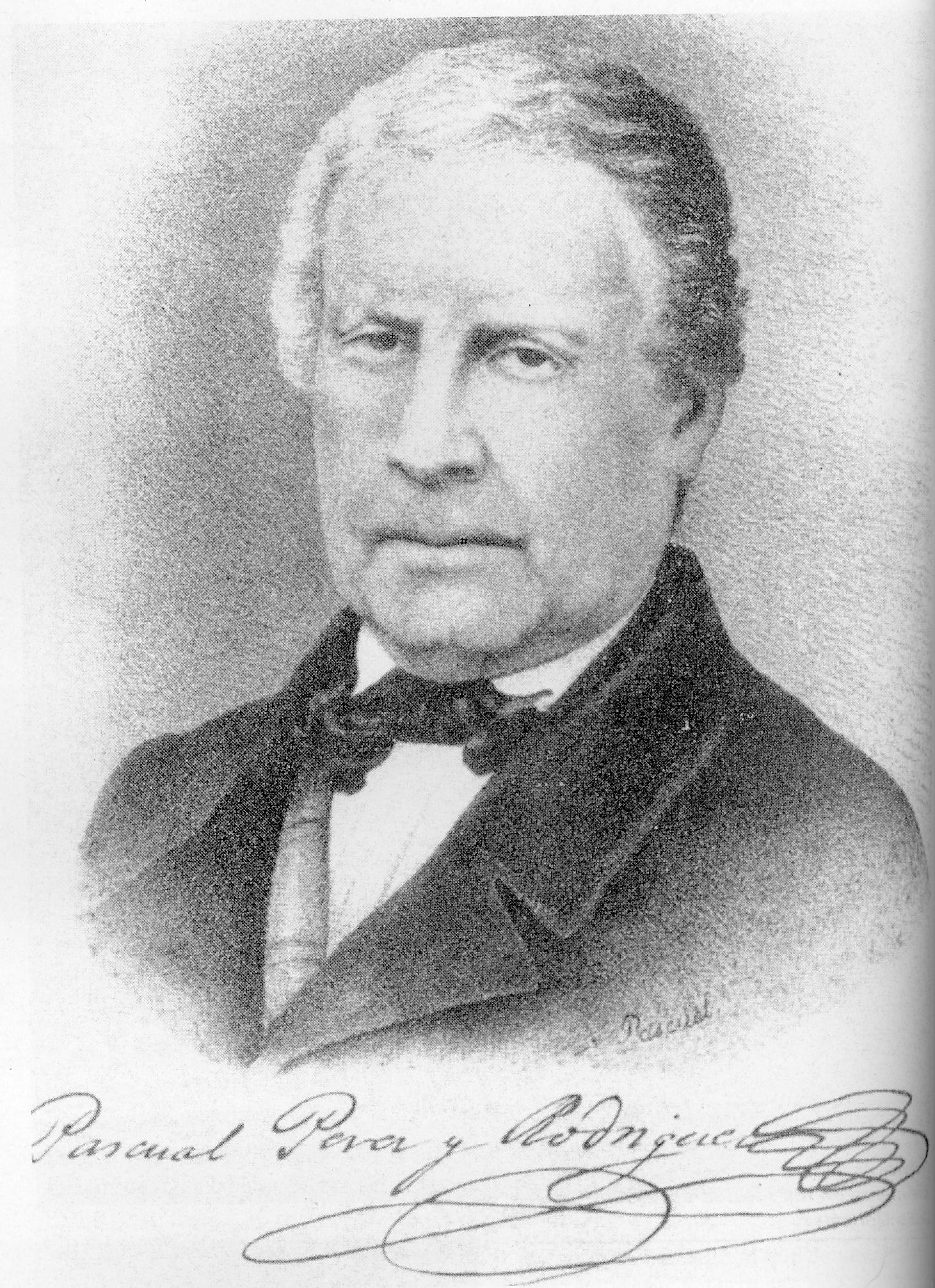 Fotografía de Pascual Pérez y Rodríguez